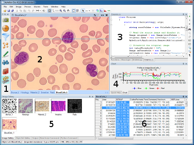 Interface graphique d'Aphelion Dev 4.x : Barre de tâches principales Visualisation de l'image courante Zone d'édition de macros Graphiques (ici un profil) Gallerie des images ouvertes Grille de mesure des objets segmentés